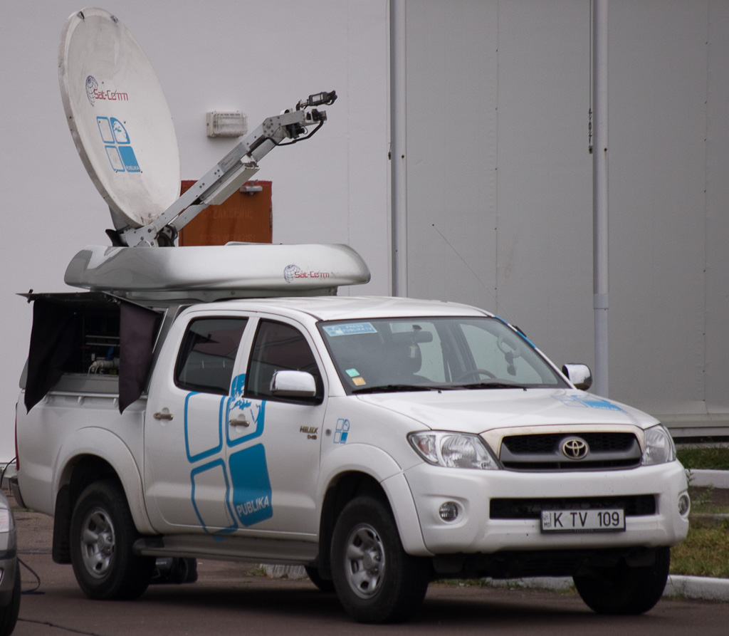 Автомобиль телеканала Publika TV